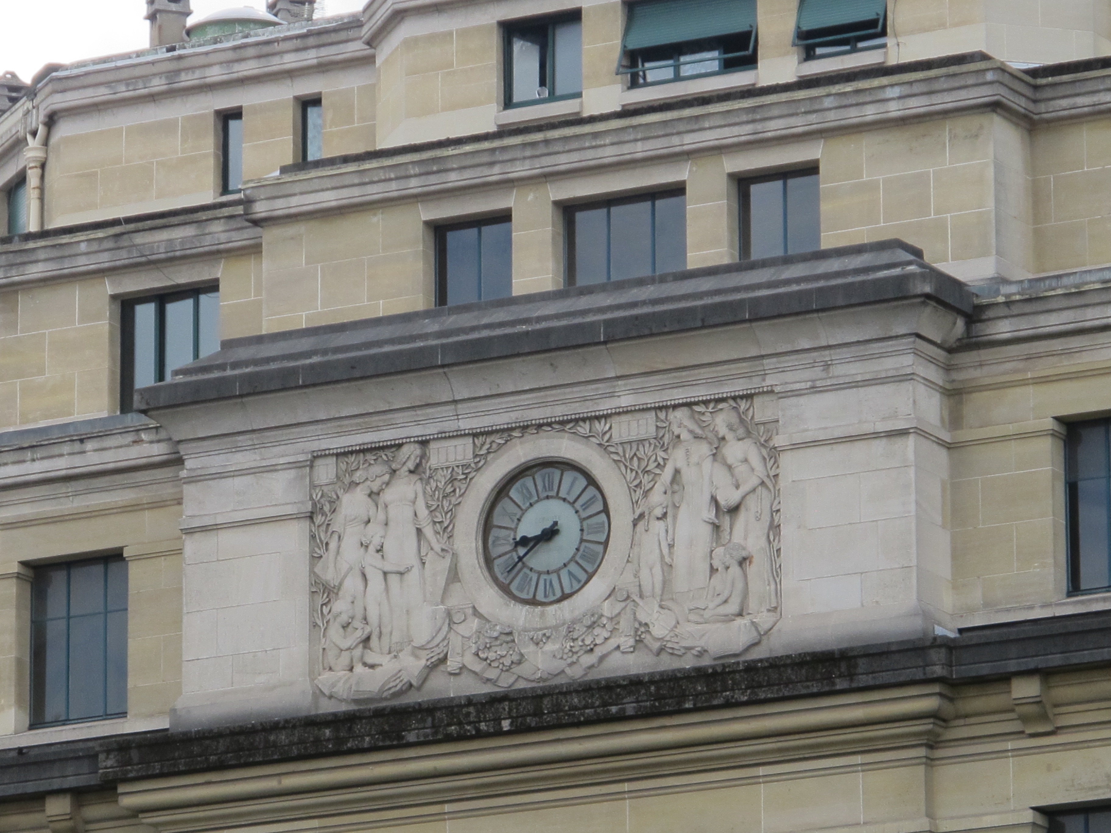 Détail de l'horloge lycée Jean-de-La-Fontaine donnant sur le boulevard Murat (Paris, 16e).